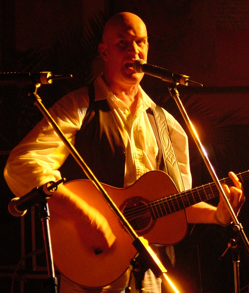 Julian Dawson live im Wormser Café Schmitz beim ersten "Honky Tonk Kneipenfestival"